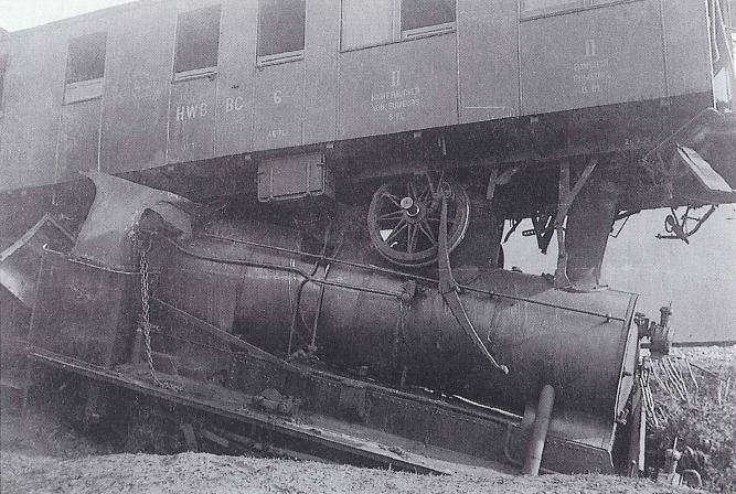 Ed 3/4 22 der RSBH und BC 6 der HWB nach dem Eisenbahnunfall in Willisau mit Zug 304